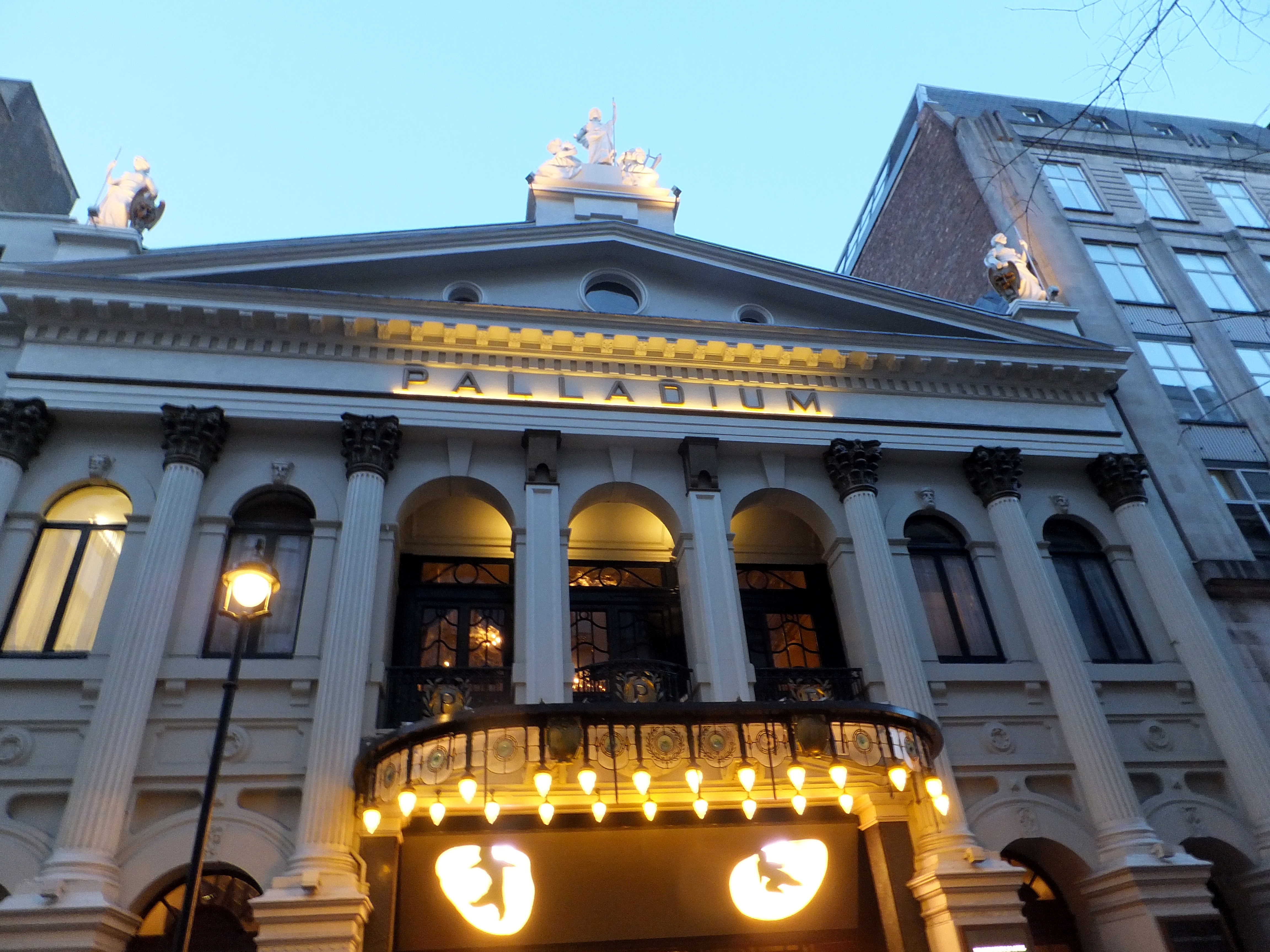 London, UK